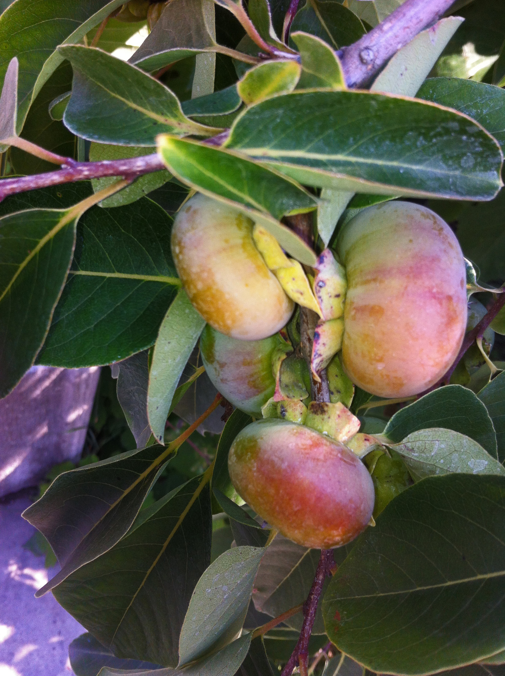 Хурма виргинская в г. Шебекино Белгородской области. Местные неукрывные сорта, выращенные шебекинцем Владимиром на ул. Свободы.